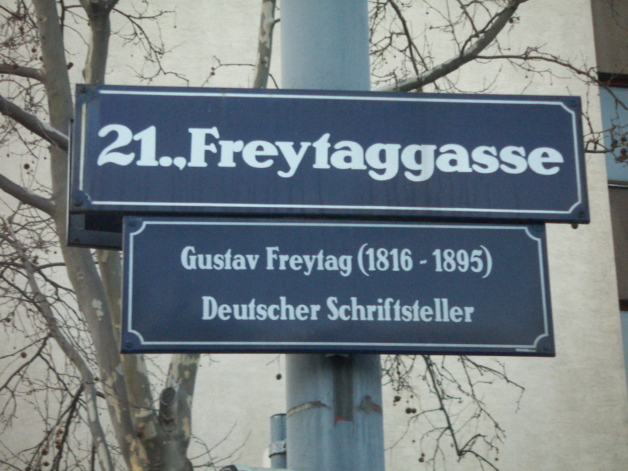 Freytaggasse: Gasse in Floridsdorf, für Gustav Freytag